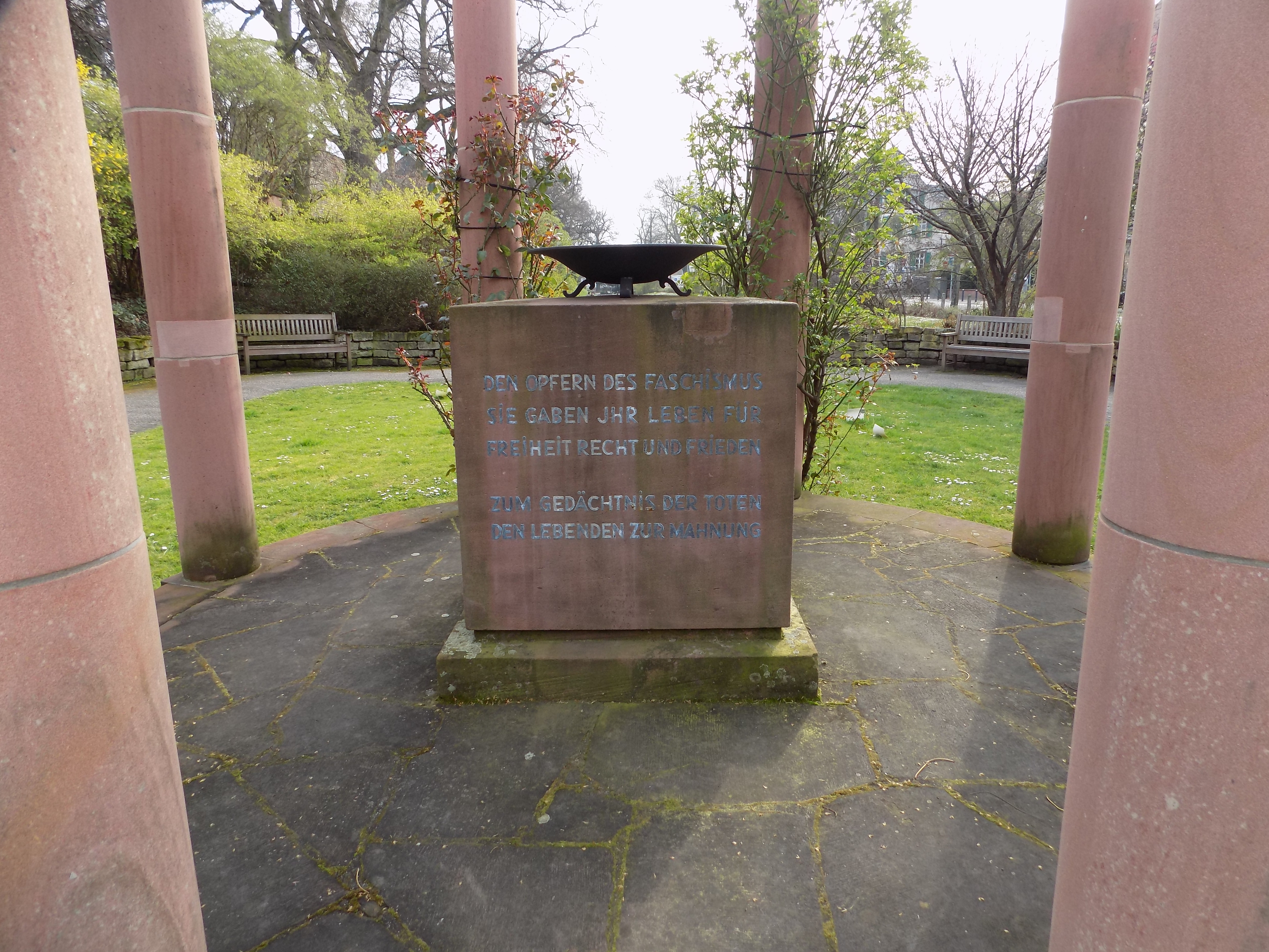 Schale mit Sockel